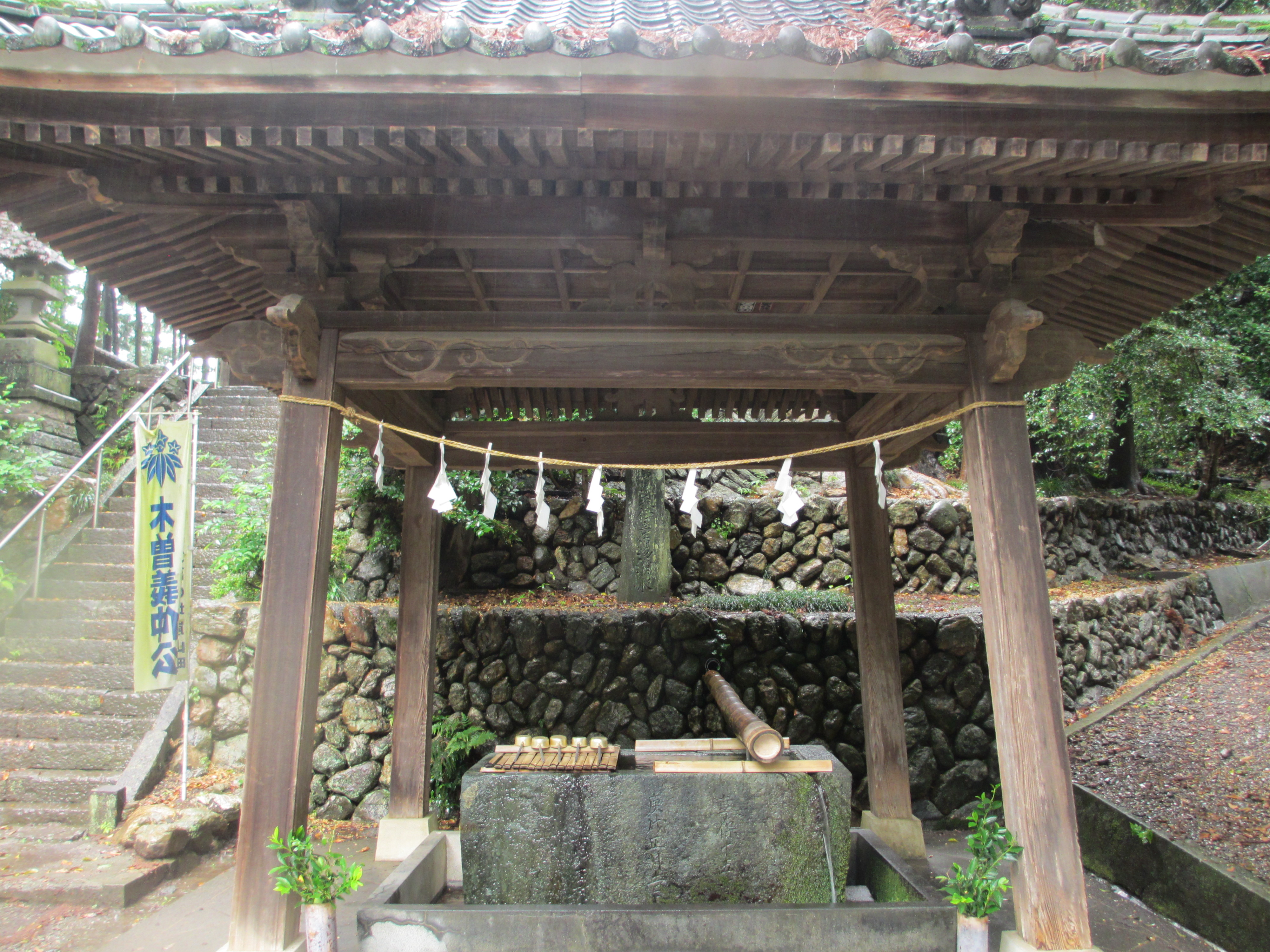 鎌形八幡宮本殿石段向かって右、石碑に刻字